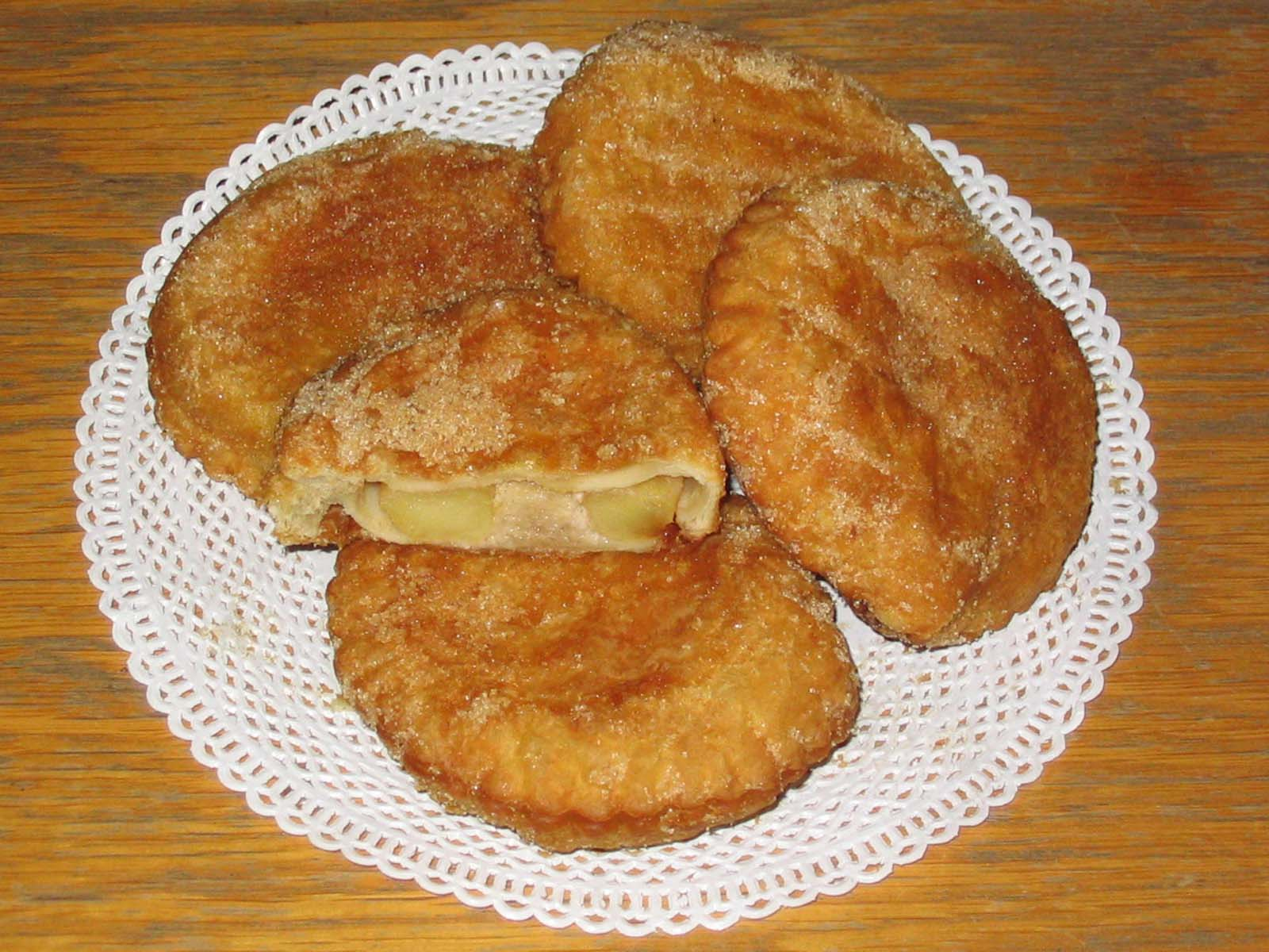 Appelbeignets. Zelfgemaakte foto.